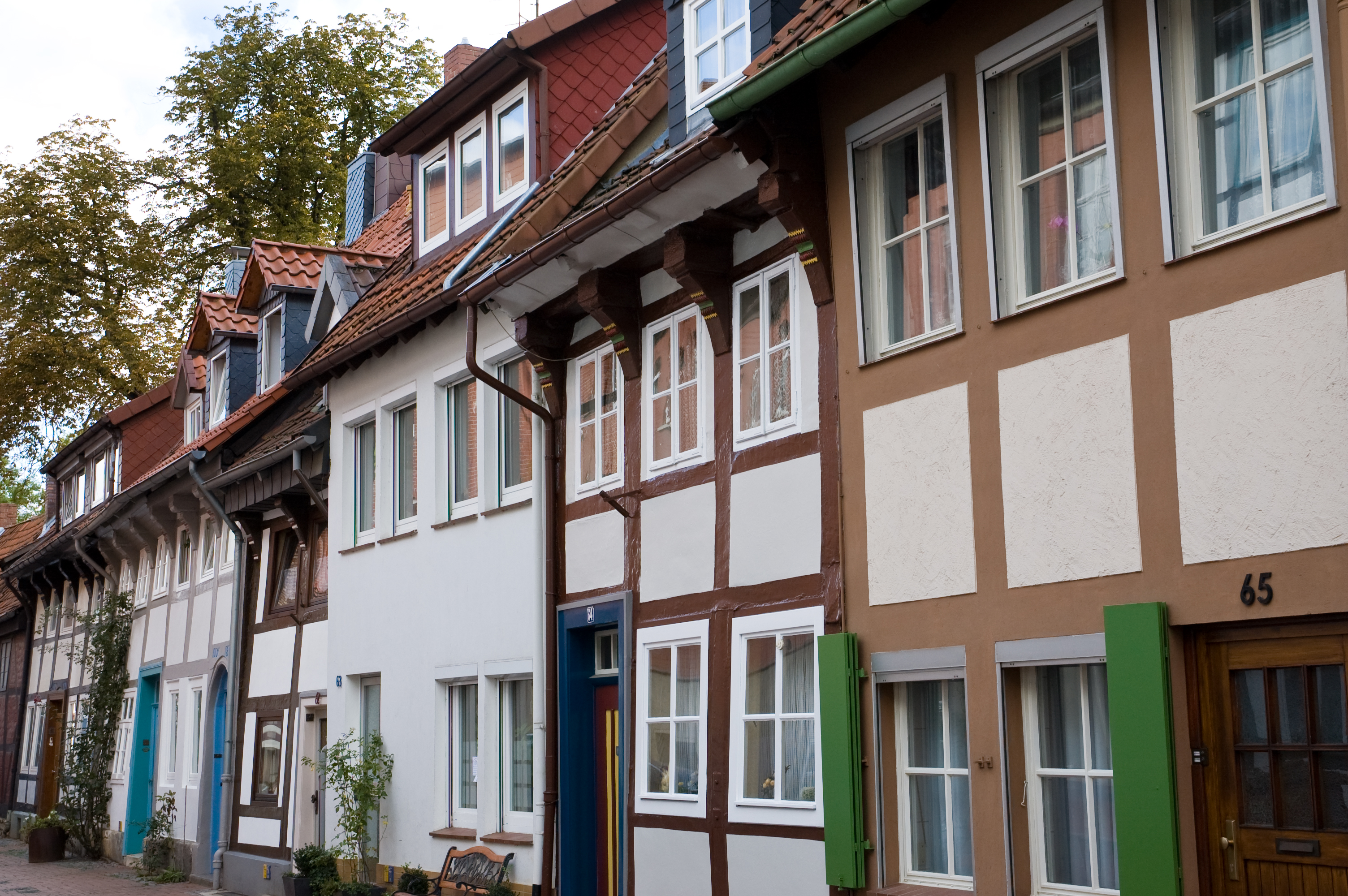 Keßlerstraße in Hildesheim (Germany)